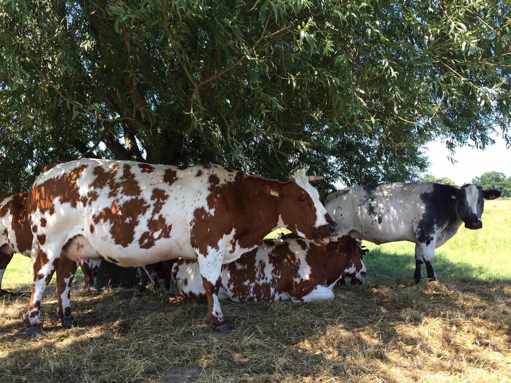 Deze koeien zoeken verkoeling onder een grote wilg op een hete zomerse dag.